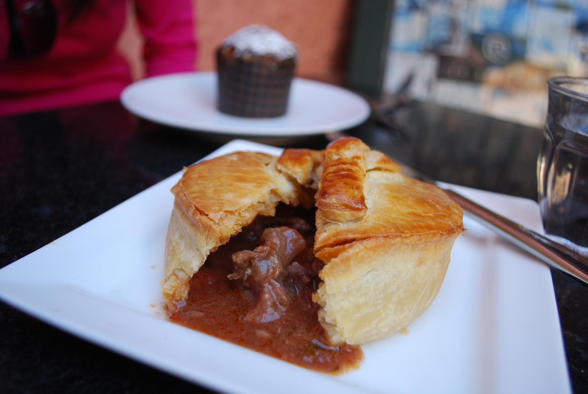 Ragoût de mouton en chausson